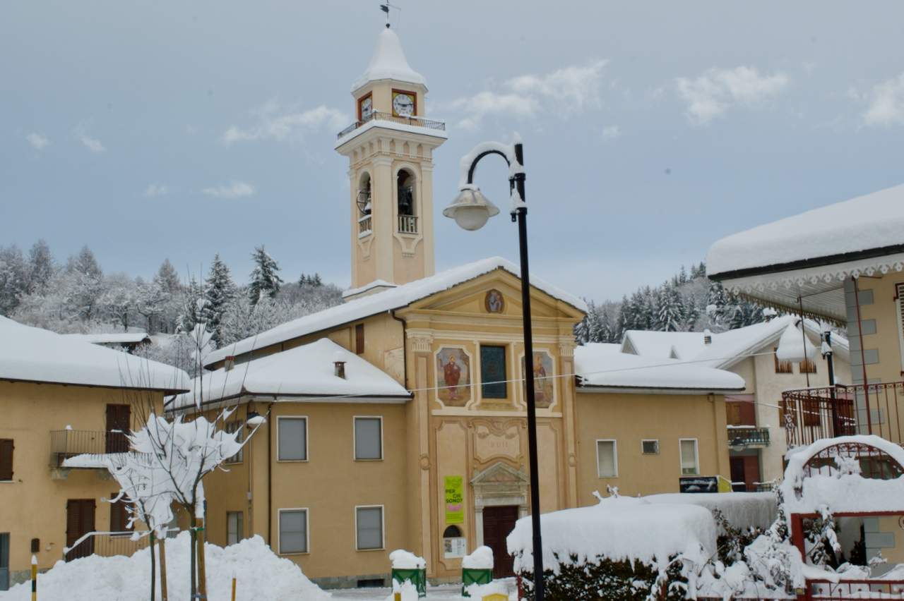 Chiesa di San Luca